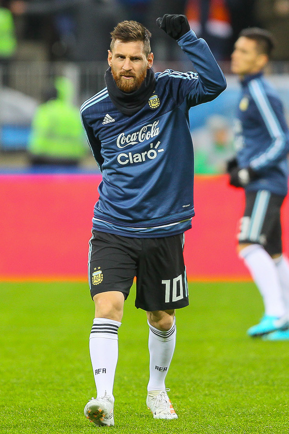 Месси и Ко обыграли сборную России